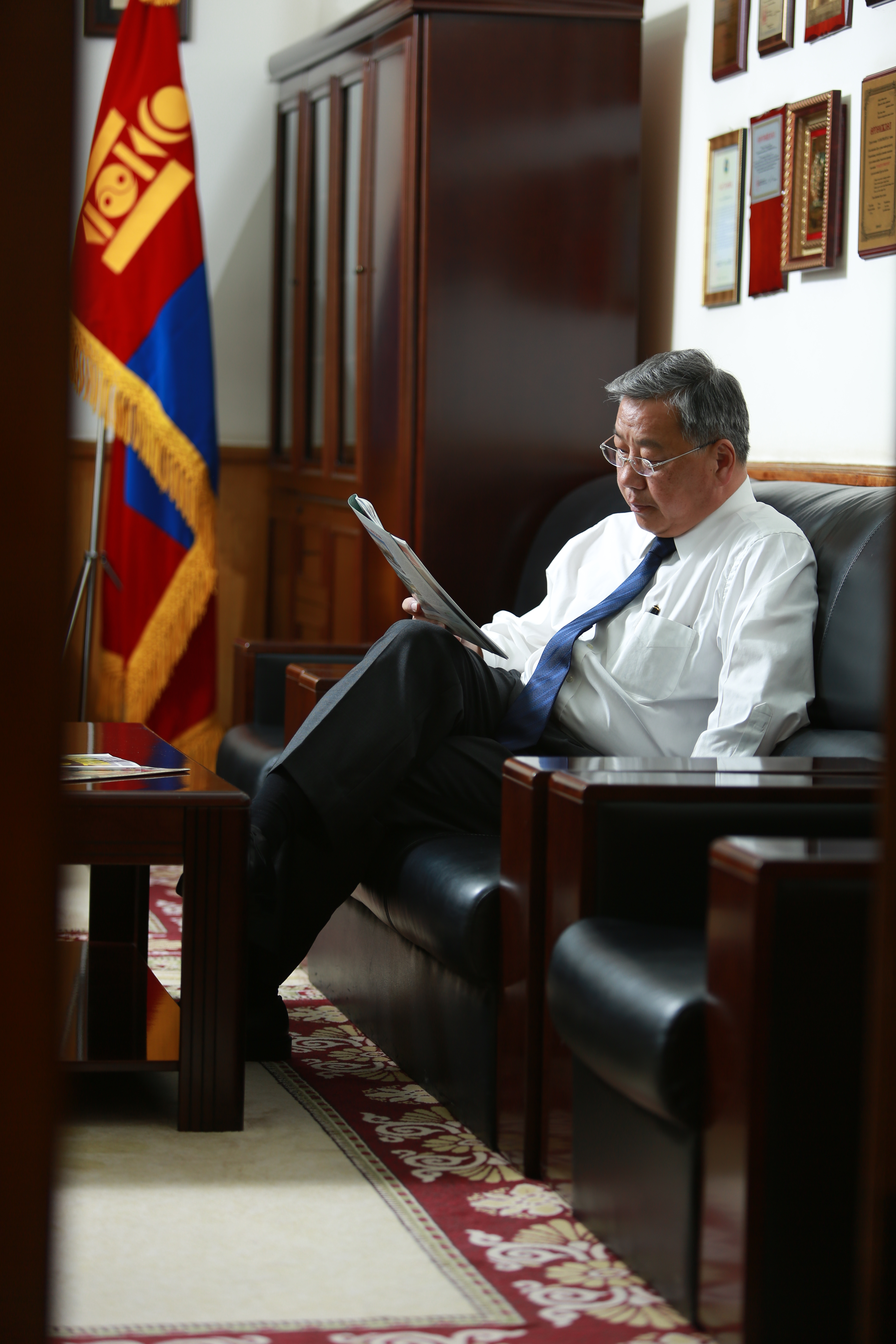 Монгол: Р.Амаржаргал ажлын өрөөндөө.